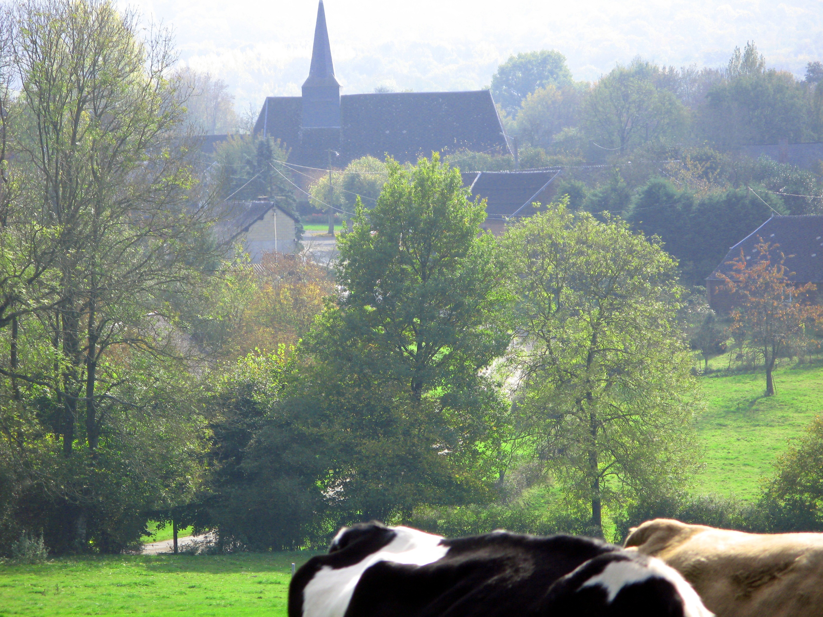 Bay, village de la commune de Blanchefosse-et-Bay (Ardennes, France) - Bay vu depuis la route de Blanchefosse. Prise de vue pas excellente, à cause du dos des vaches. Si j'avais choisi à ce moment un autre cadrage : pour éviter les vaches, je n'aurais pu convenablement montrer le contrebas du pré par le chemin qui file vers le village entre les arbres en laissant les vaches "entières" dans le champ, celles-ci auraient été trop au premier plan et auraient fait croire que l'intérêt principal de la photo n'était pas le village.